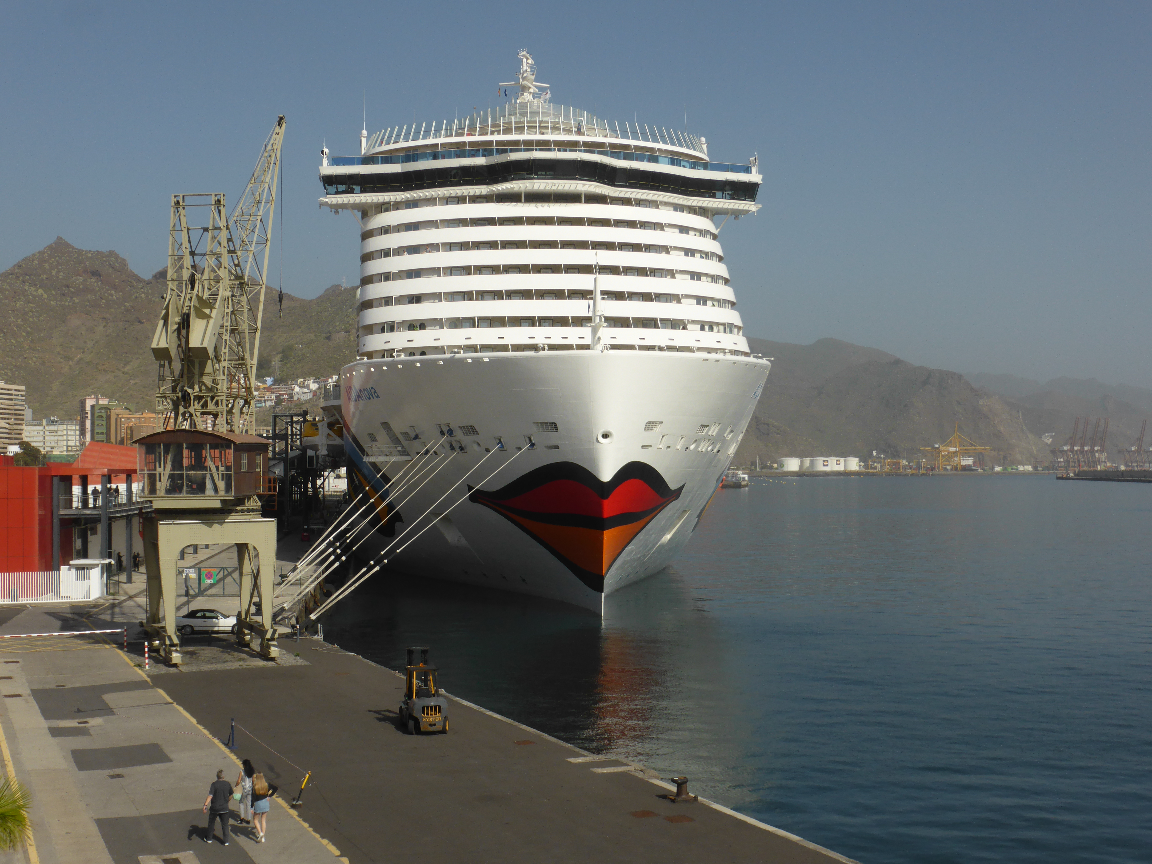 AIDAnova" (IMO: 9781865), buque de cruceros de turismo, matriculado en el puerto de Génova (bandera de Italia). Atracado en el puerto de Santa Cruz de Tenerife. Eslora (largo): 337 metros. Utiliza como combustible gas natural licuado.